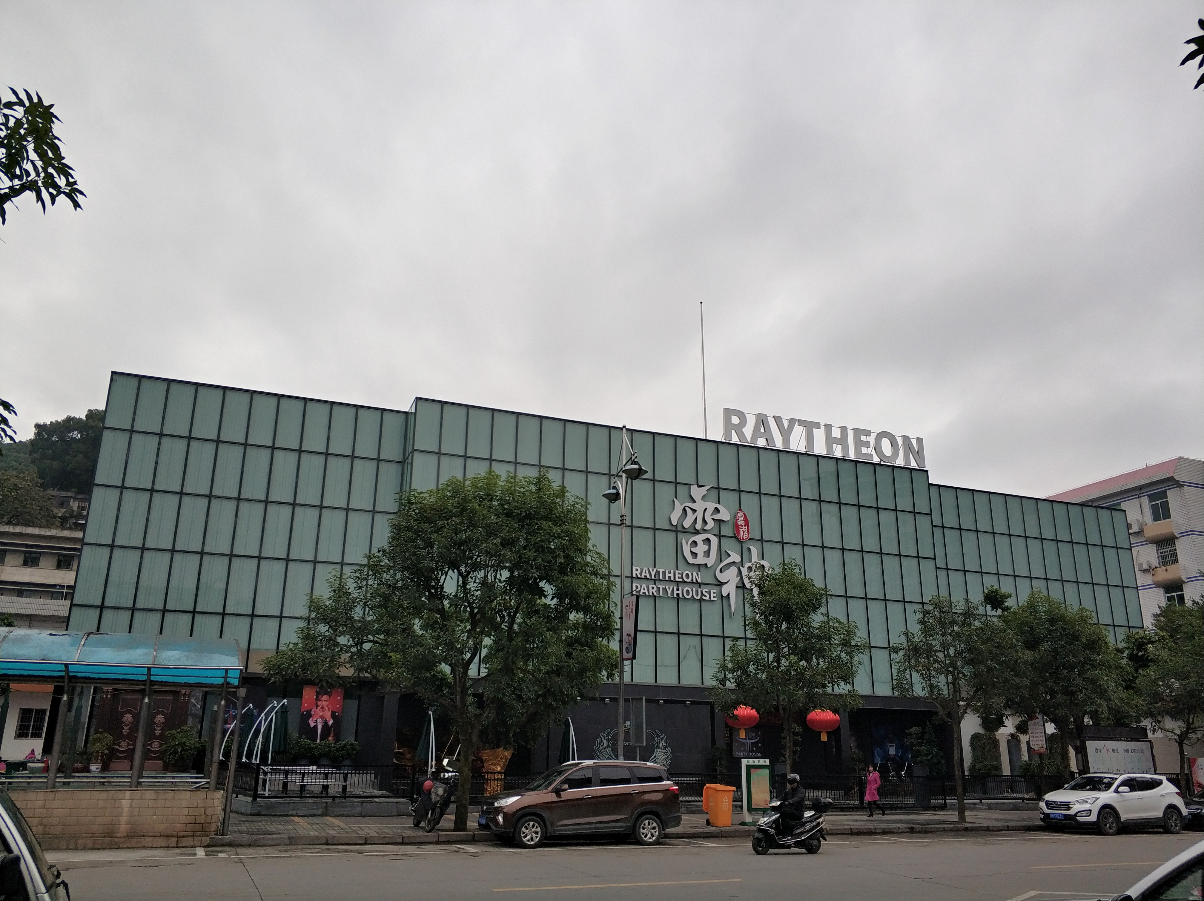 中文（中国大陆）: 水南站，原南平站。